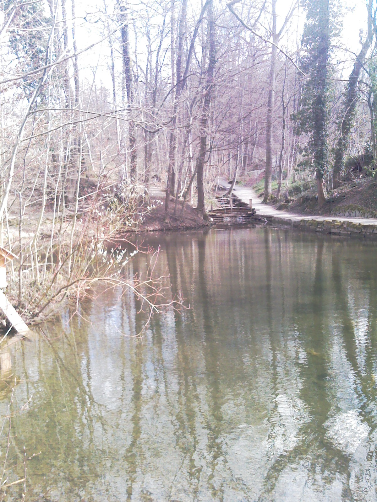 Zollikon, Fohrbach - Zollikon, lageto de la rivereto Fohrbach